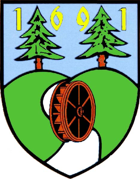 Znak obce Desná